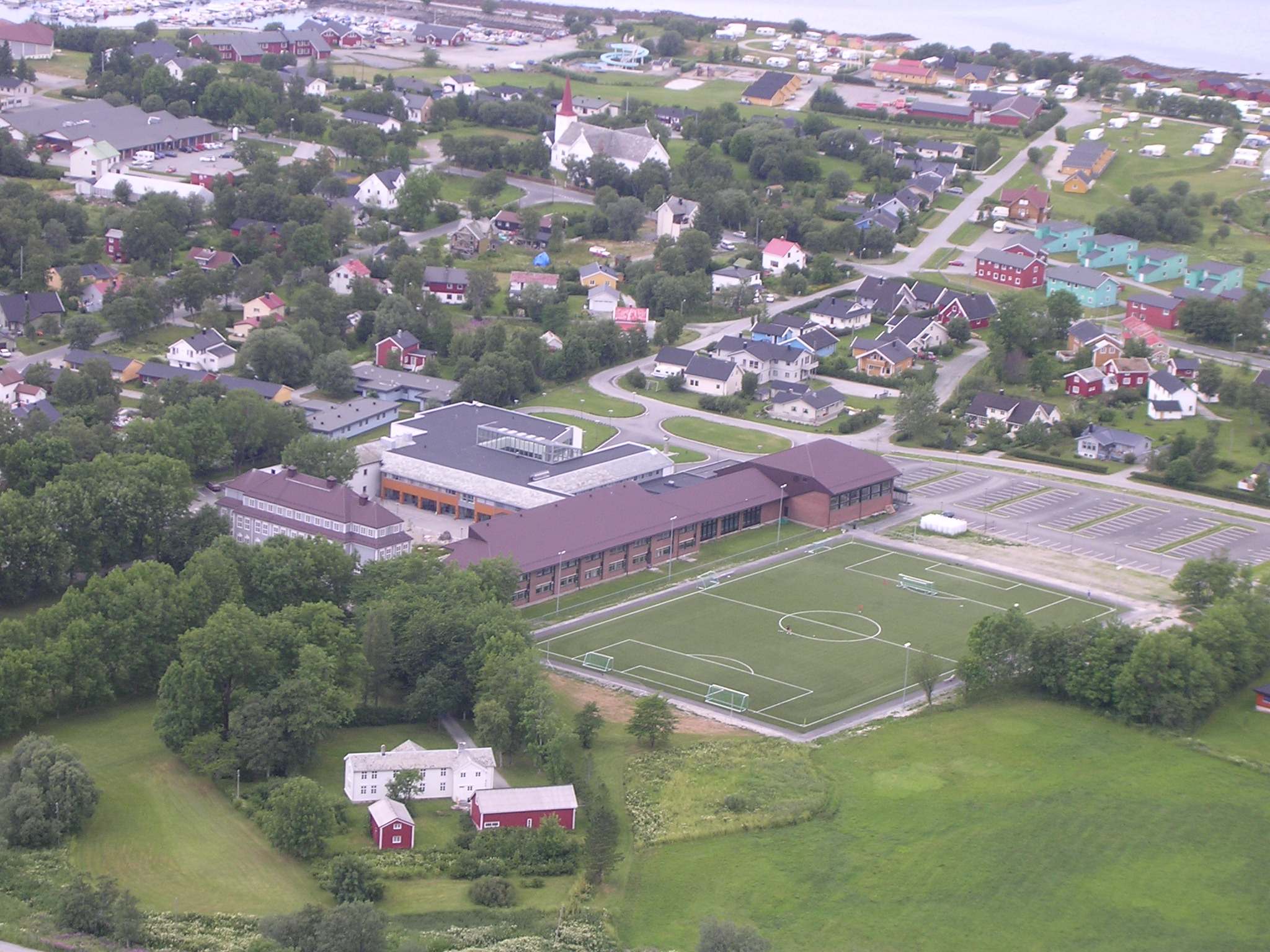 Høgskolen i Nesna sett ovenfra